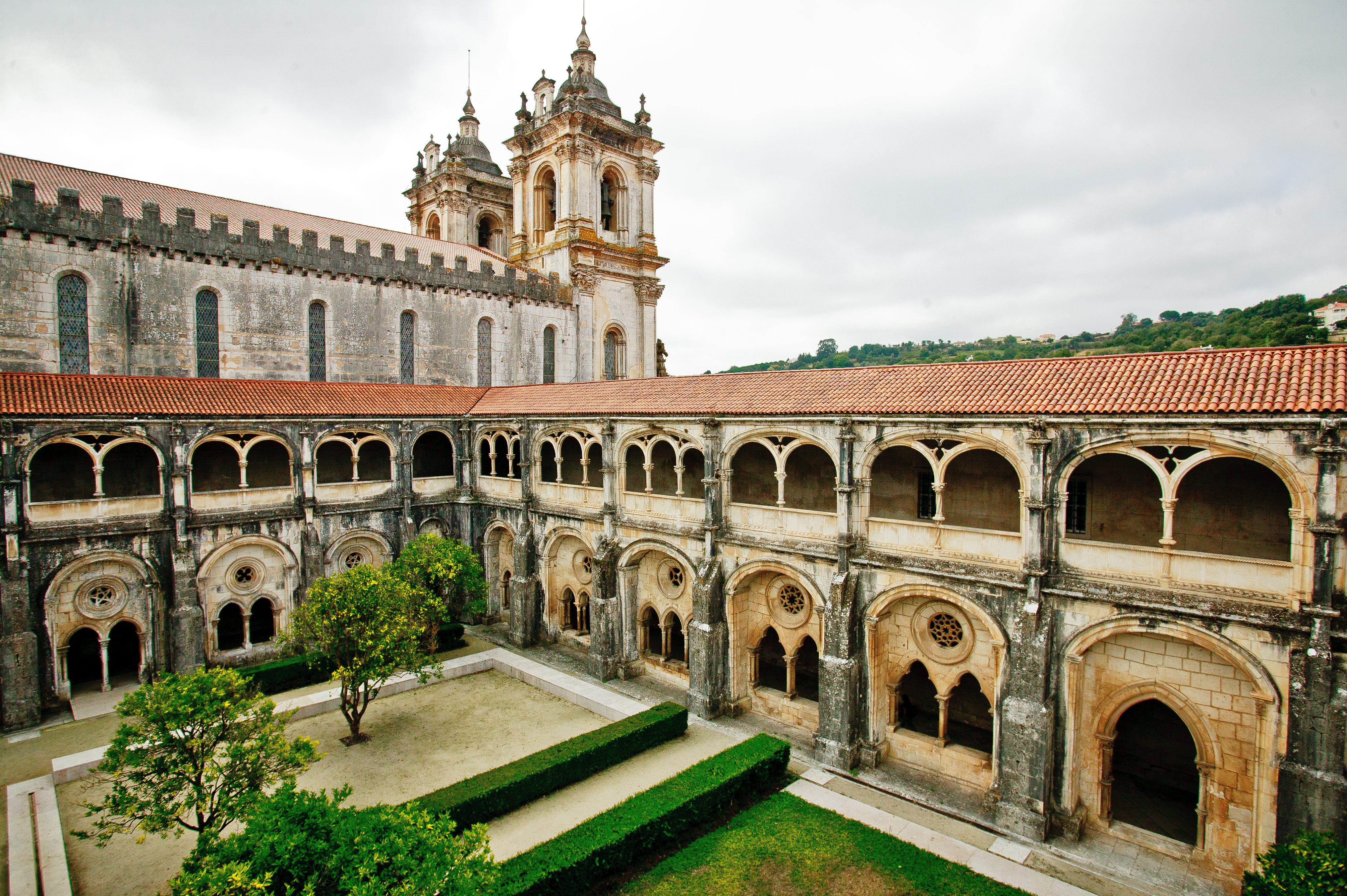 Alcobaça, Opactwo Cystersów w Alcobaça Wikidata has entry Q593147 with data related to this item.